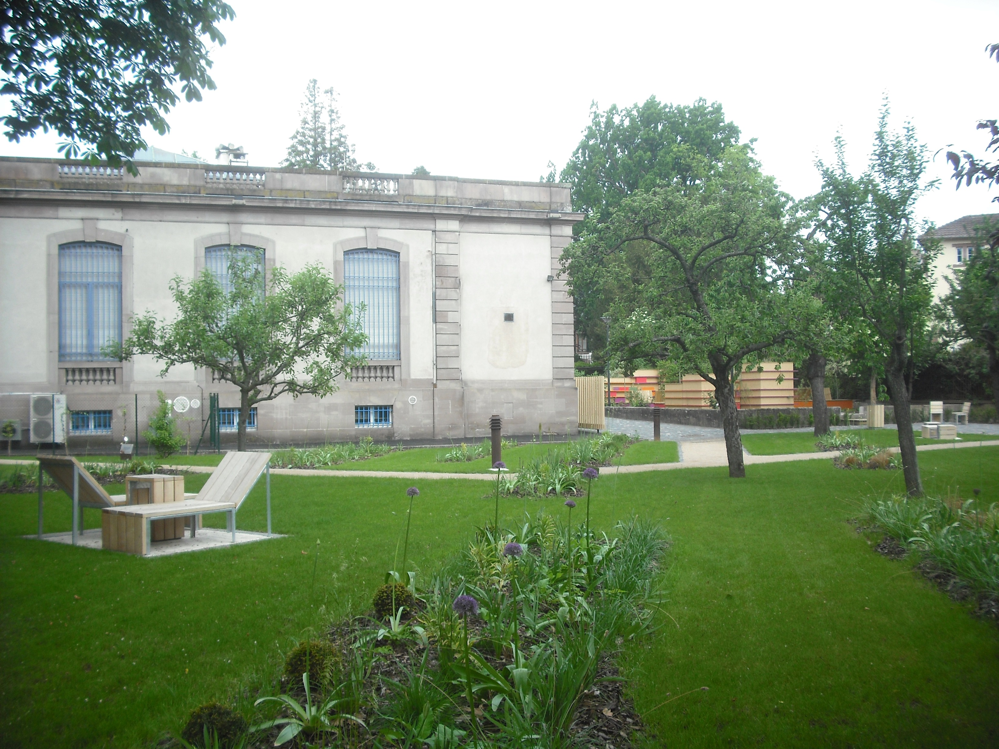 Jardin Beatus Rhenanus, Sélestat, France.